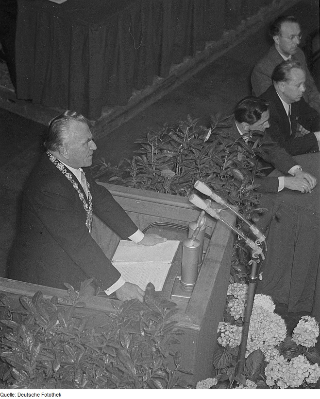 Original image description from the Deutsche Fotothek Georg Mayer (Rektor der Universität)